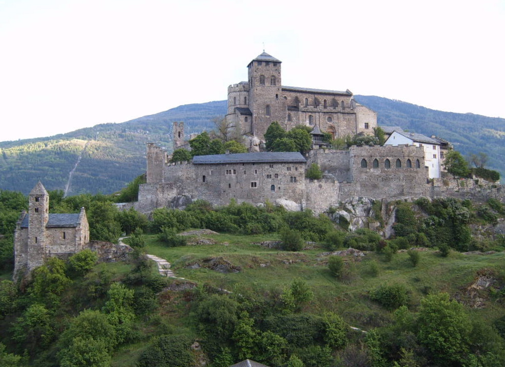 Basilique de Valère, Sion, Valais (Switzerland)